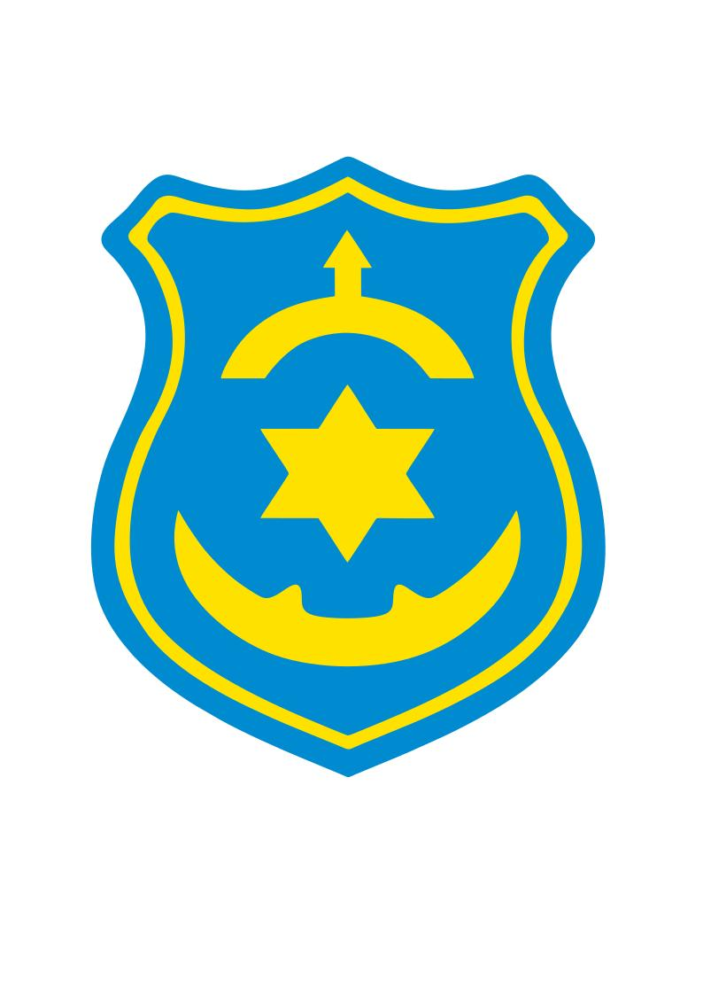 Kańczuga herb